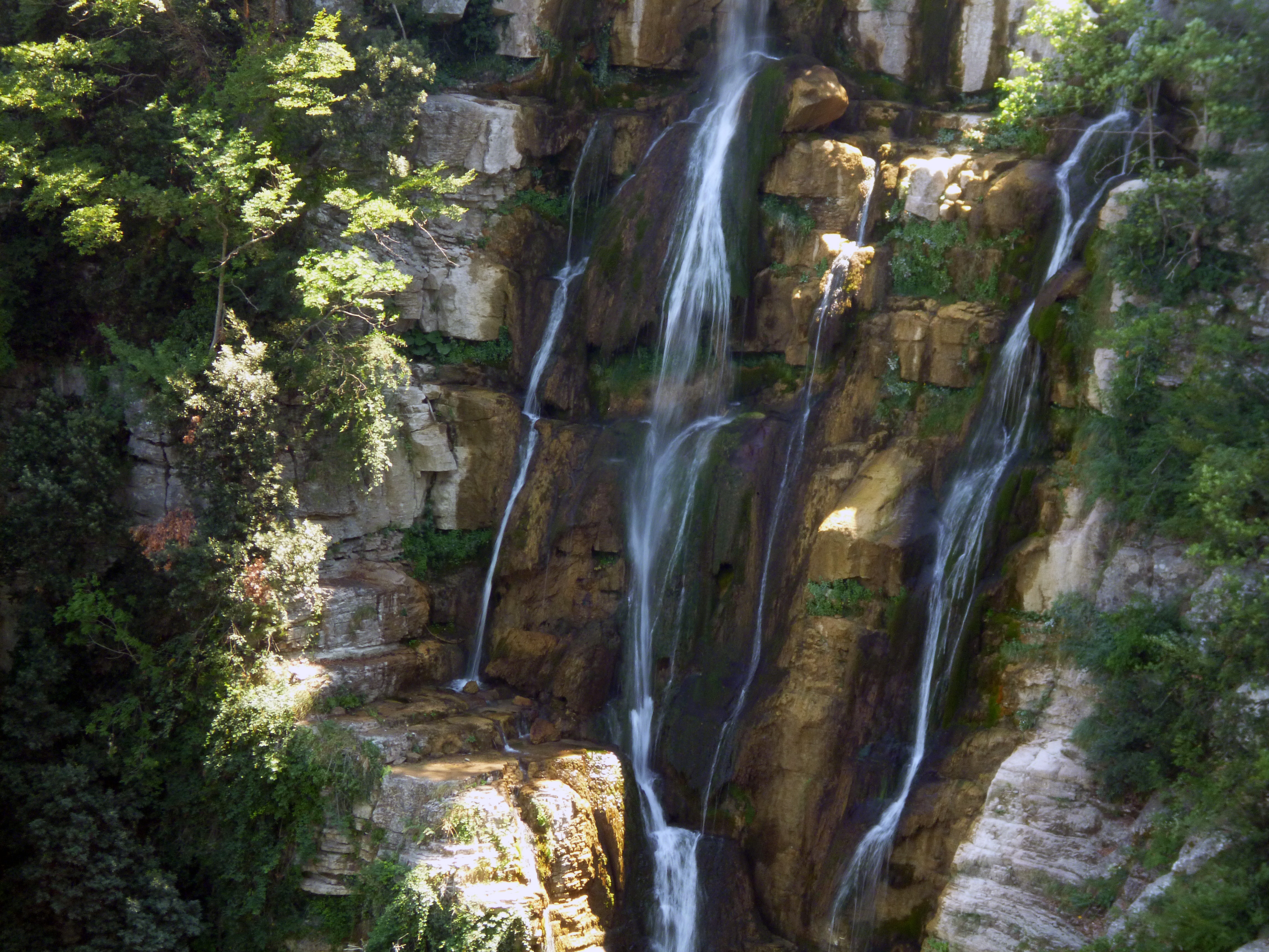 Cascate del Rio Verde This is a photo of a monument which is part of cultural heritage of Italy. The authorisation for taking photos of this object was provided by the World Wide Fund for Nature Italy.